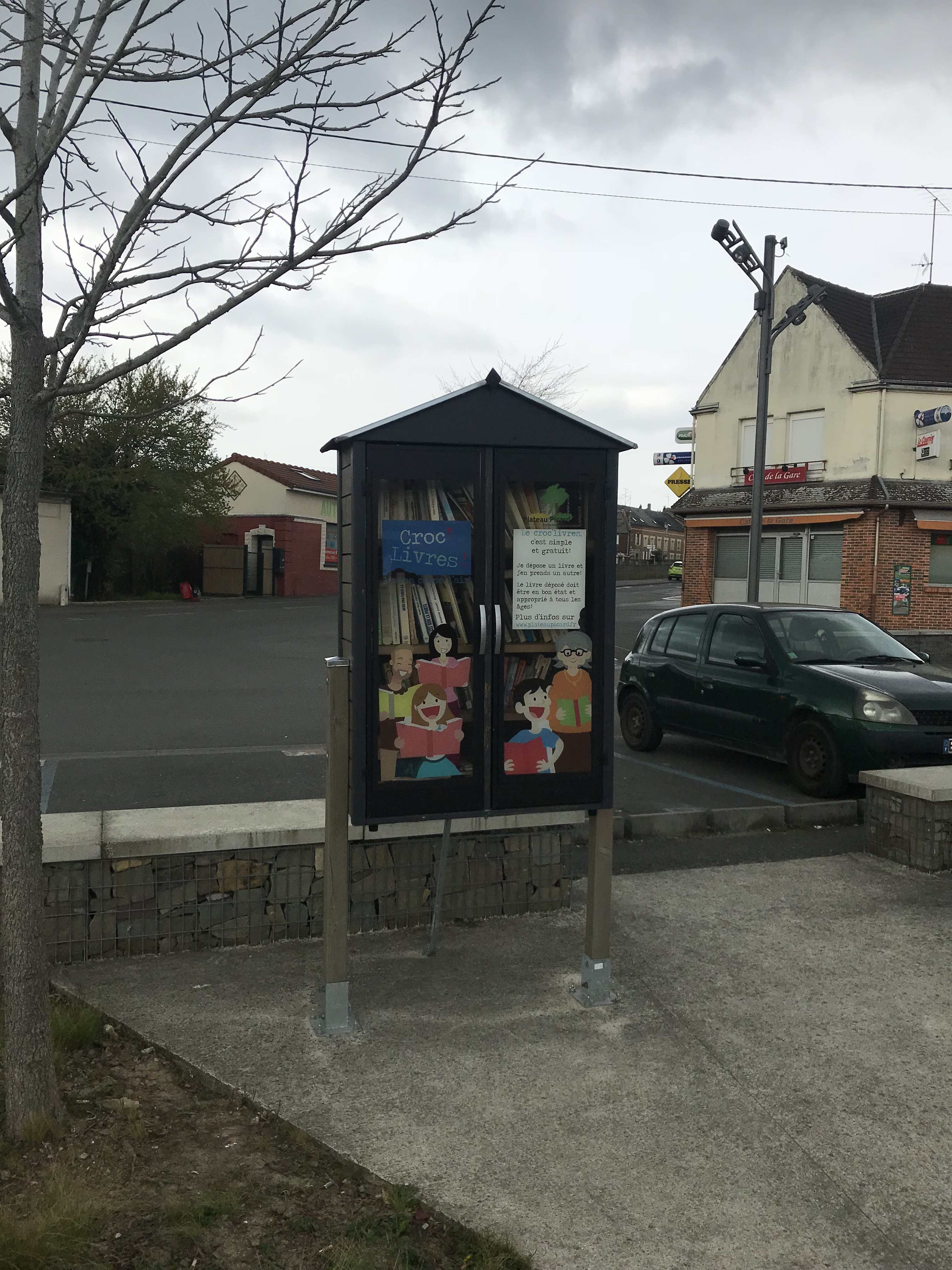 Croc'livre St Just en Chaussée